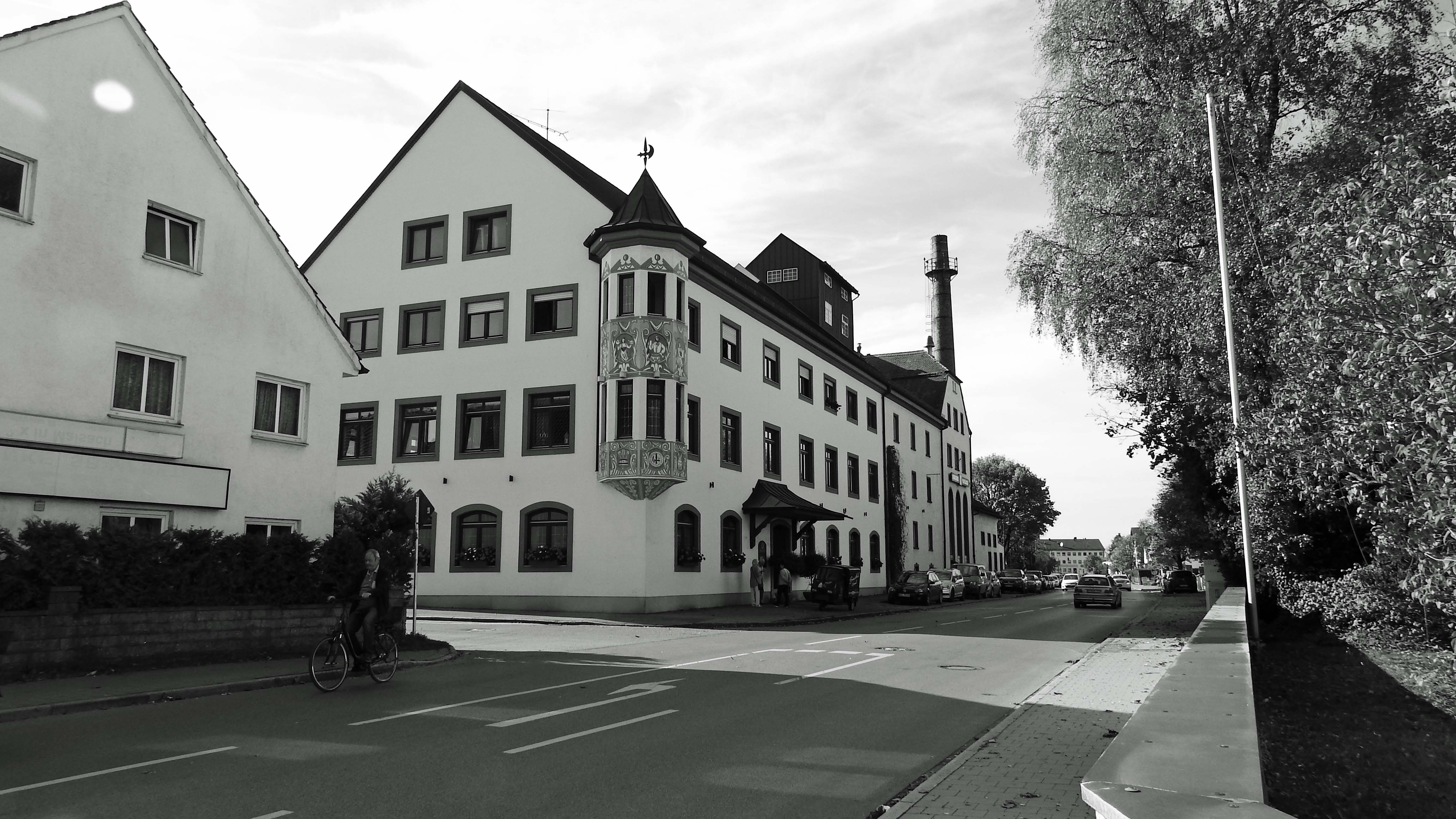 Brauerei Maisach von Nordosten